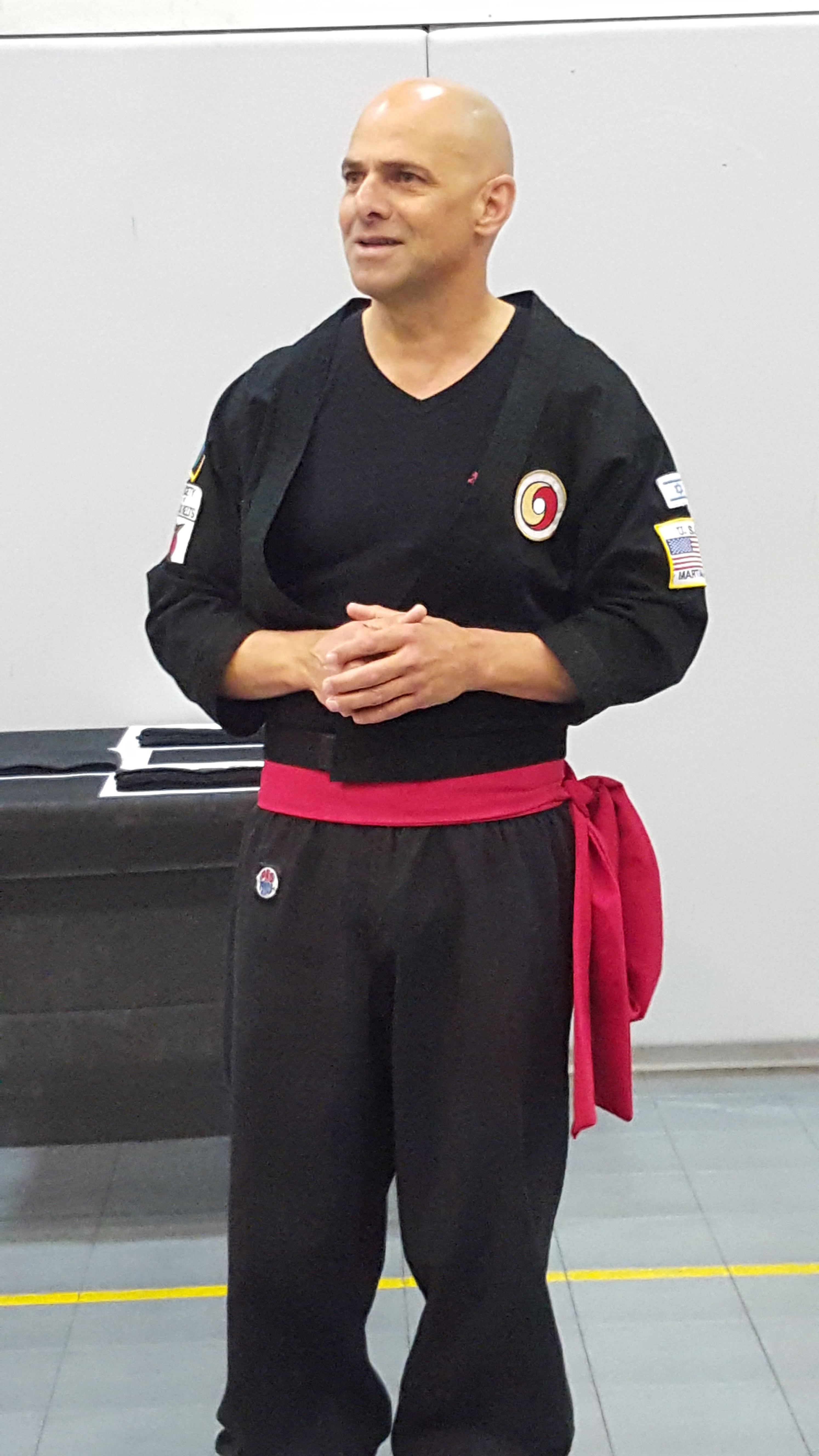 סיג'ו אייל קורן בלבוש מסורתי בטקס חלוקת חגורות של כבוד, תל אביב 29.03.2018